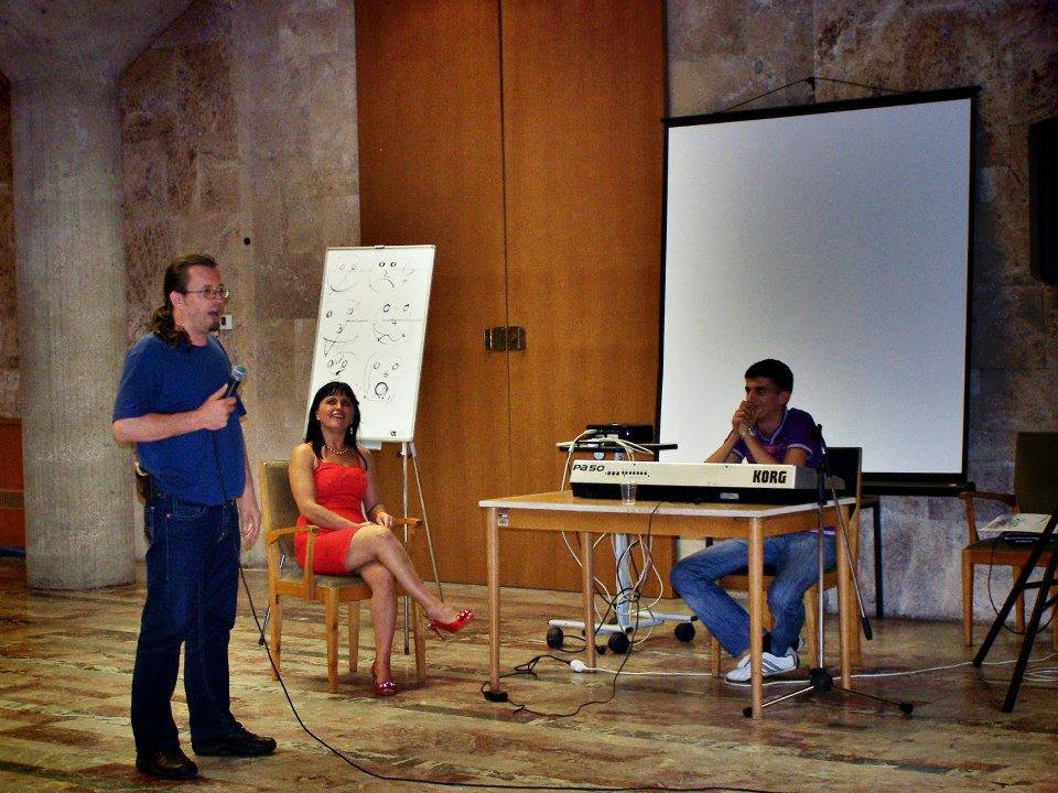 Iložba fotografija i poetsko veče autora Branislava Lukić Luke u Sloveniji...